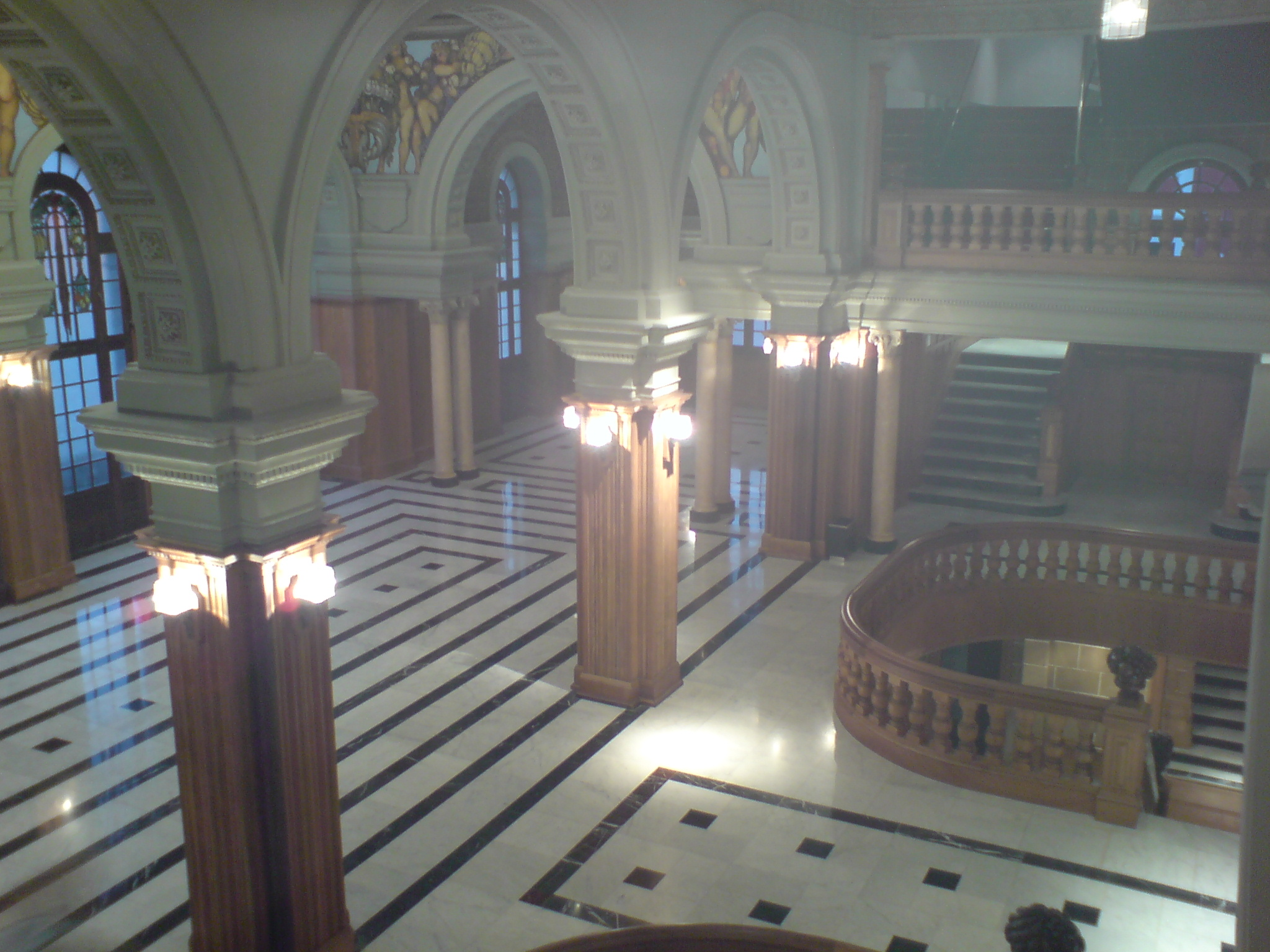 Teatro Pérez Galdós, sala Saint Saëns en planta principal, escaleras de acceso desde planta calle. 2007 Las Palmas de Gran Canaria.